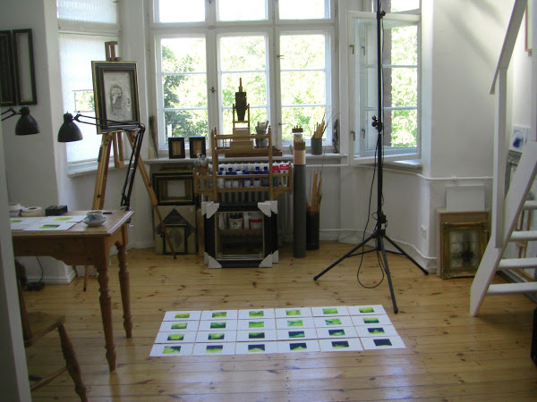 Das Atelier von Andreas Rank in der Bonner Strasse 5 in Berlin